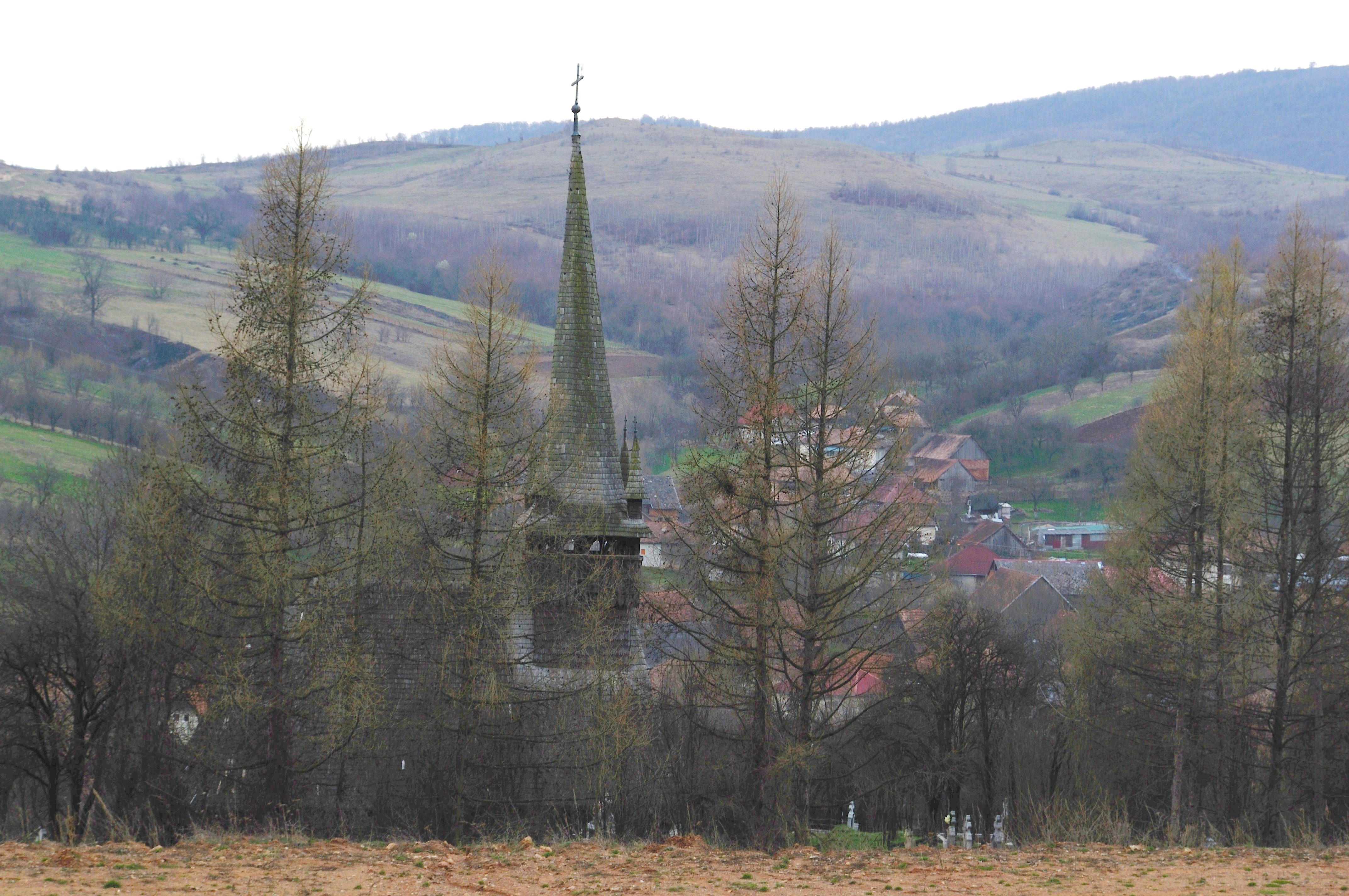 Biserica de lemn din Agârbiciu, județul Cluj